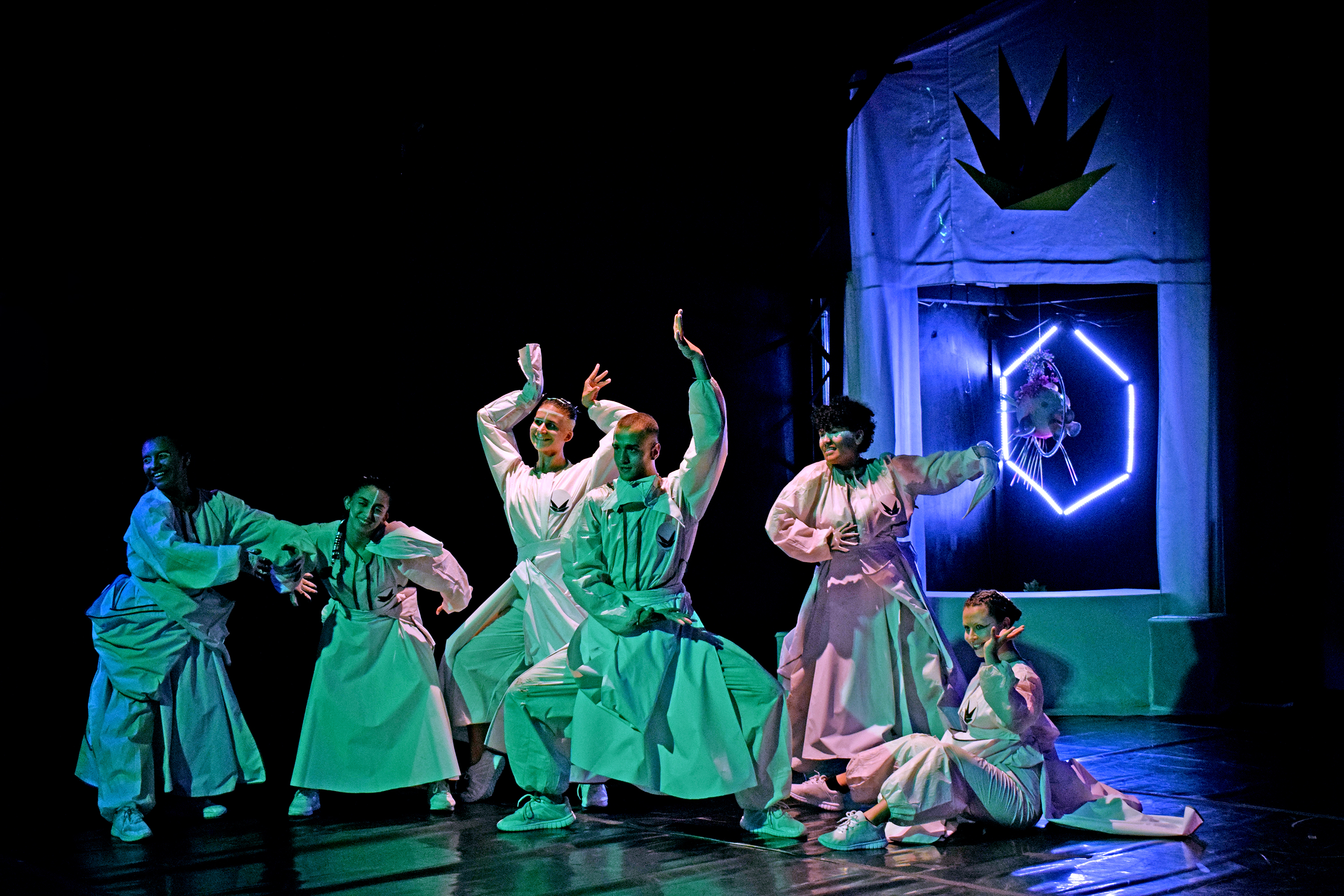 Obra teatral "PIÑA", dirección de Adrián Brais (Costa Rica) la Temporada de Jóvenes Dirigiendo 2019 del Teatro Universitario, Universidad de Costa Rica.